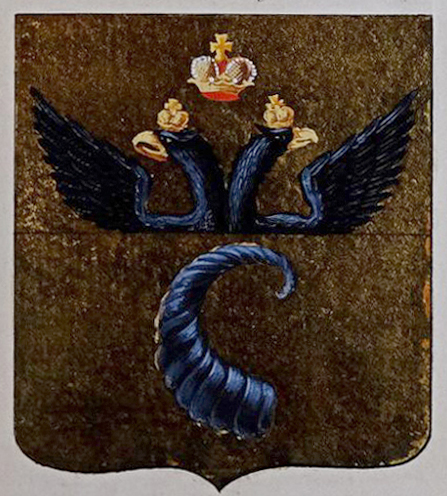 Беларуская (тарашкевіца): Рагачоў (Rahačoŭ). Герб места